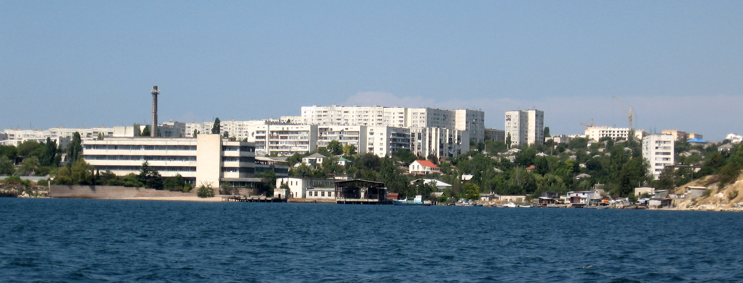 Radiogorka neighbourhood